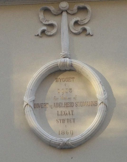 Divert og Adelheid Sudmann til minne.